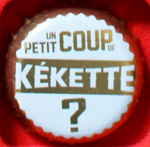 Capsule de bière Kékette (Normandie, France).